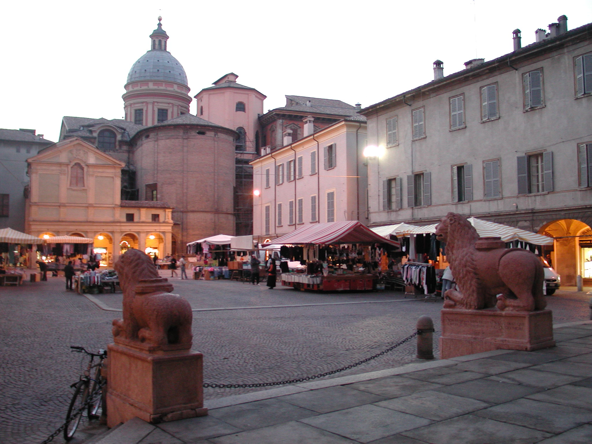 Reggio Emilia, Italy, Piazza San Prospero